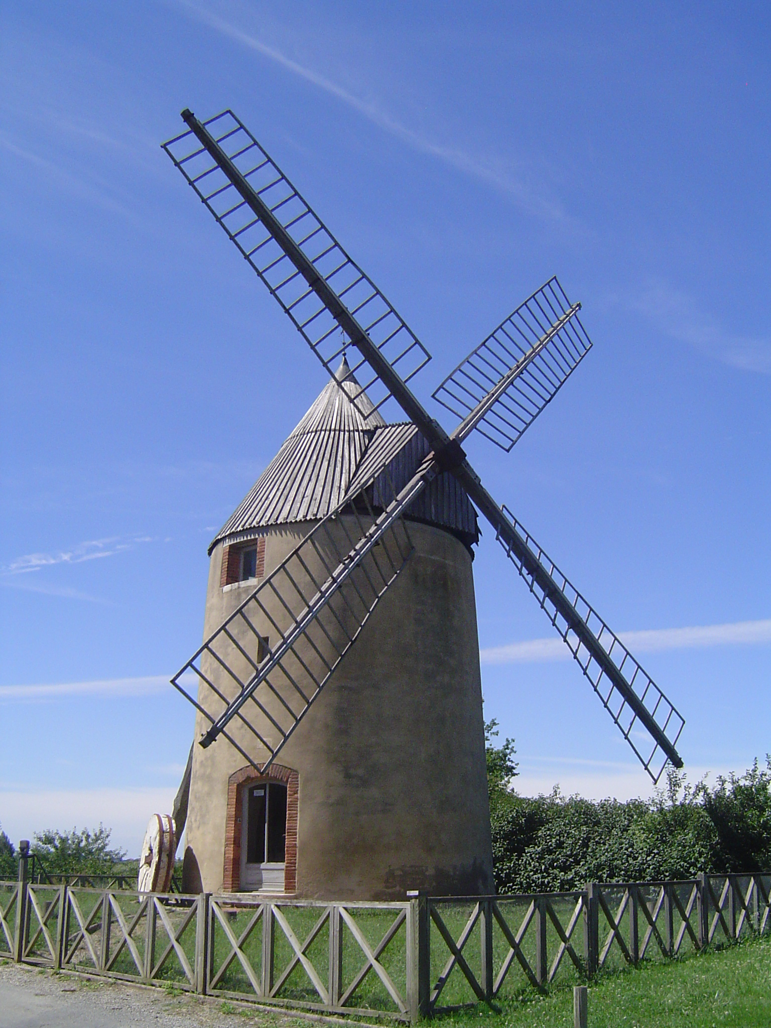 Vue du moulin à vent de Montbrun-Lauragais datant de 1680 inscrit à l'inventaire supplémentaire des Monuments Historiques.